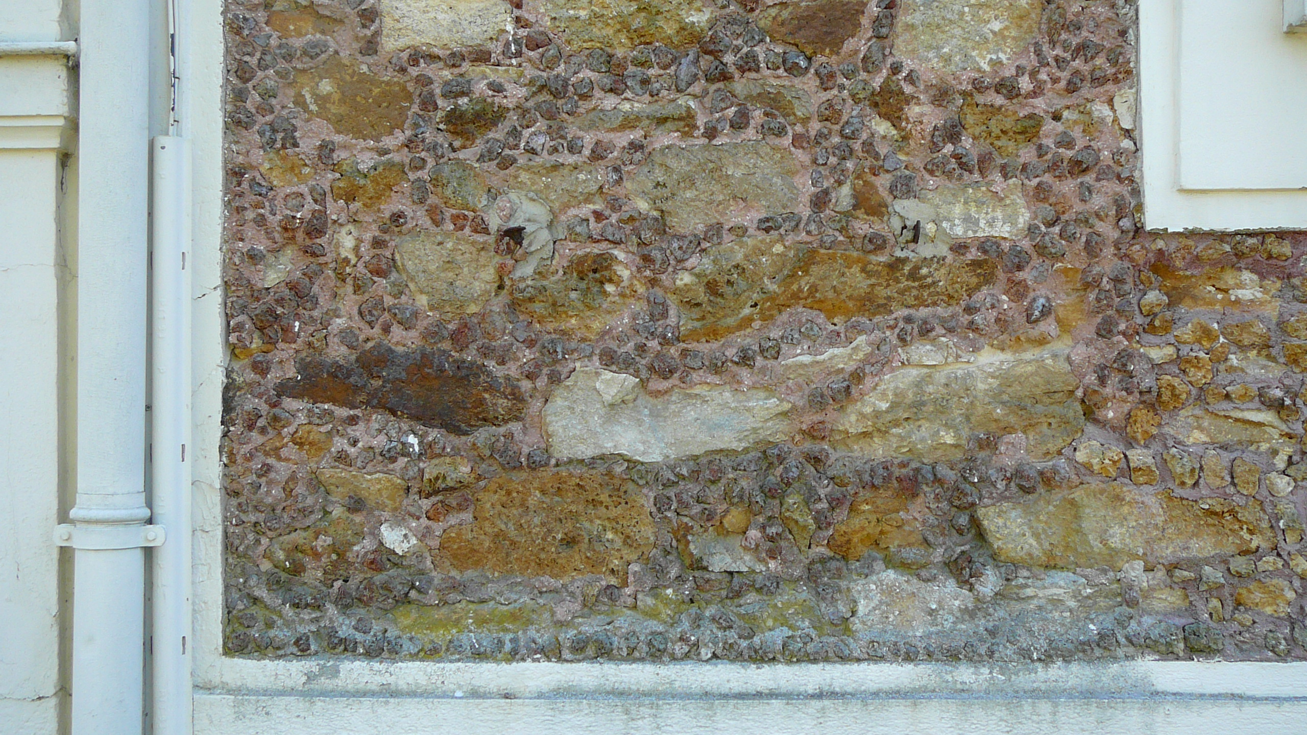 Détail de joints ornementaux réalisés par la méthode du rocaillage (détail de la façade de la Mairie de Cély en Bière - France).